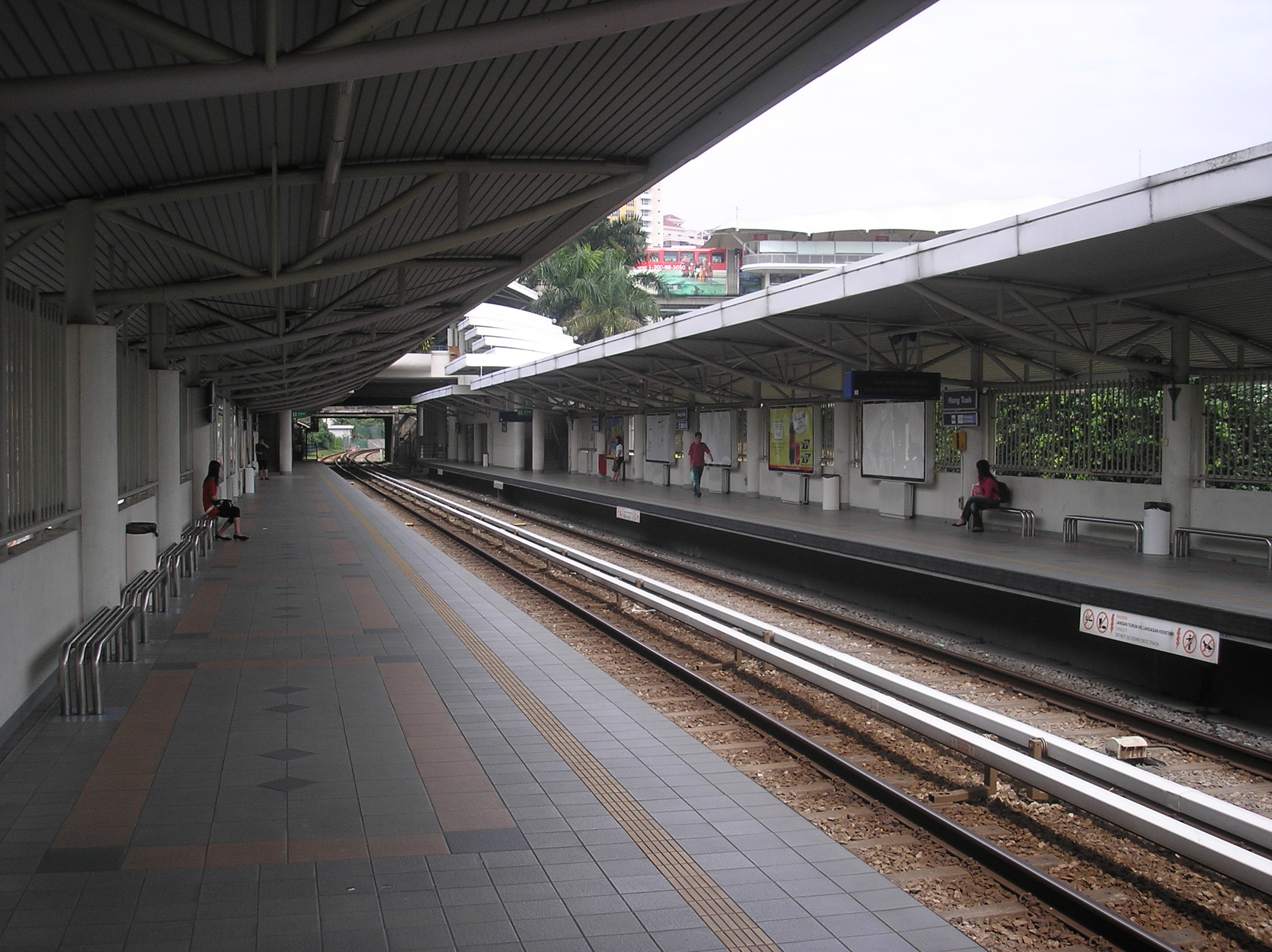 The Hang Tuah LRT station (Sri Petaling Line), Kuala Lumpur, Malaysia.